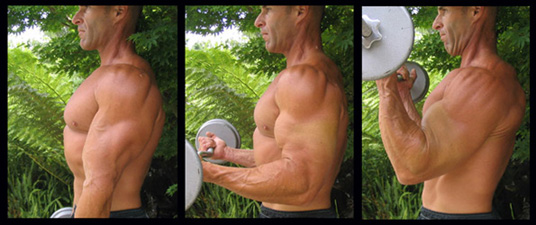 Dit is eerder een oefening voor de m. brachialis dan voor de m. biceps brachialis, aangezien de biceps ook de functie van supinatie doet is een "armcurl"-oefening beter. Deze oefening bestaat erin van in een gestrekte arm en een geproneerde voorarm naar een geplooide arm en gesupineerde voorarm te komen.